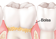 Zahnfleischtasche